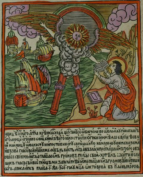 "БИБЛИЯ ДЛЯ БЕДНЫХ" (1692-1696 гг.) ВАСИЛИЯ КОРЕНЯ.